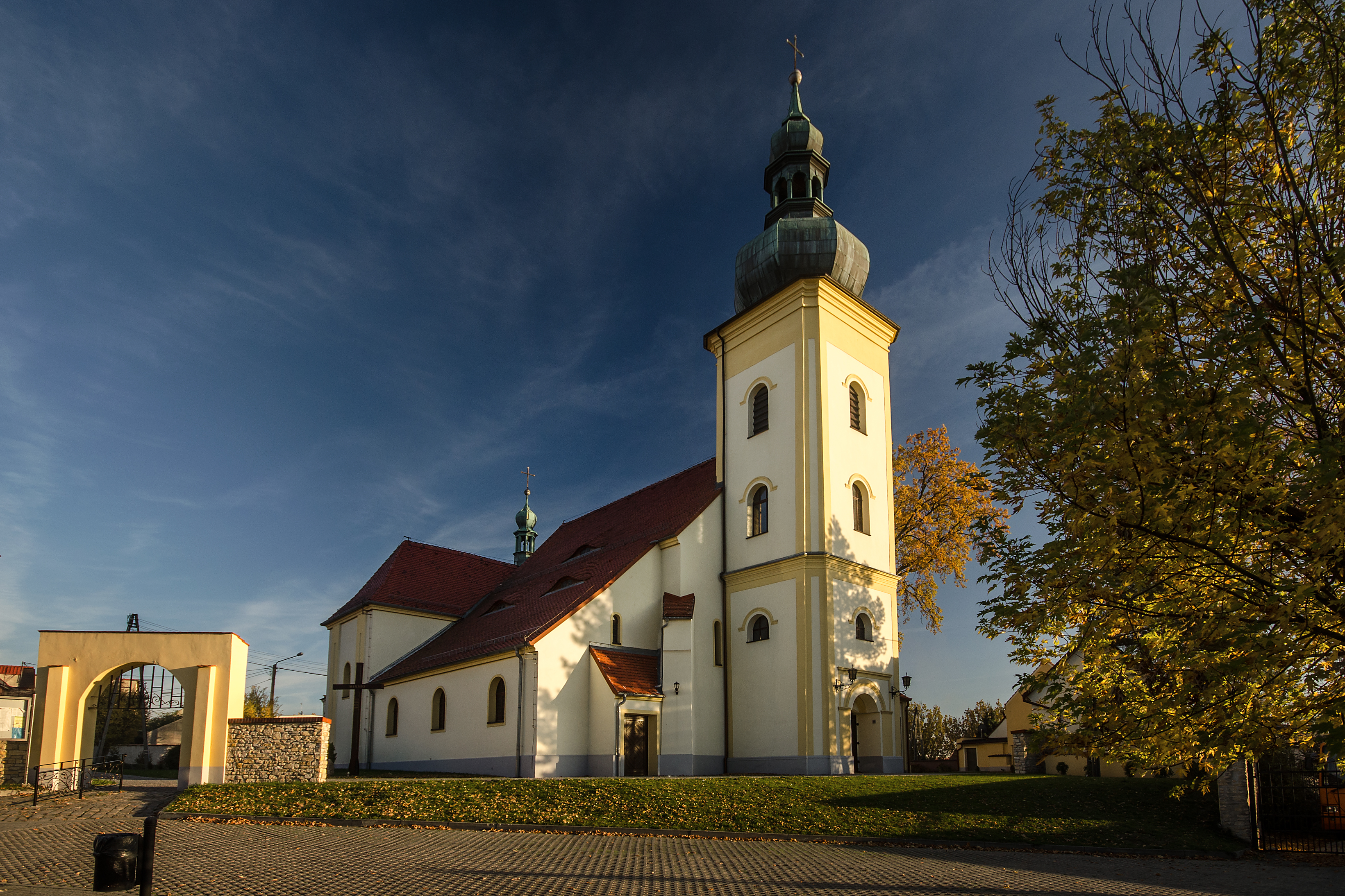 Leśnica, kościół par. p.w. Św. Trójcy, 1717, 1843